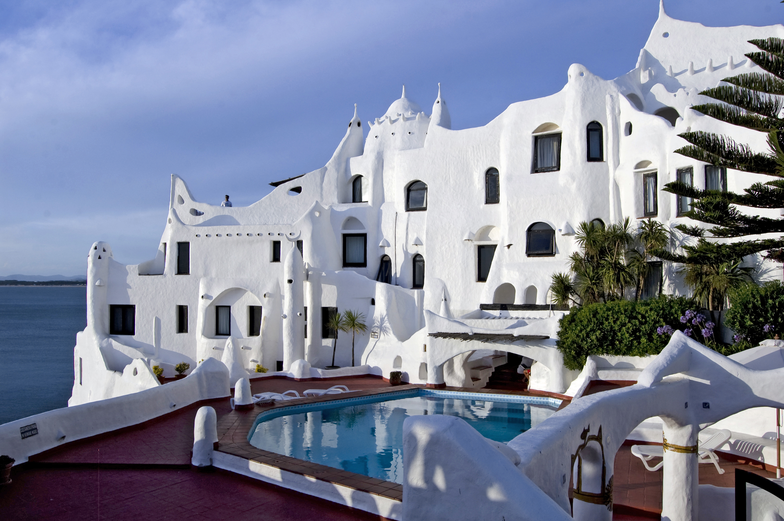 Carlos Páez Vilaró's "Casapueblo." Punta Ballena, Uruguay.